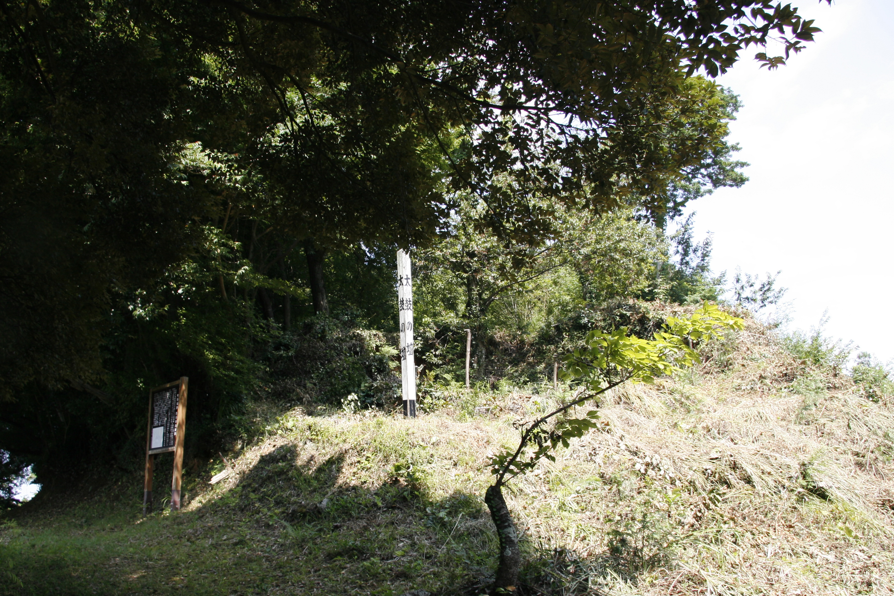 葛尾城主郭部